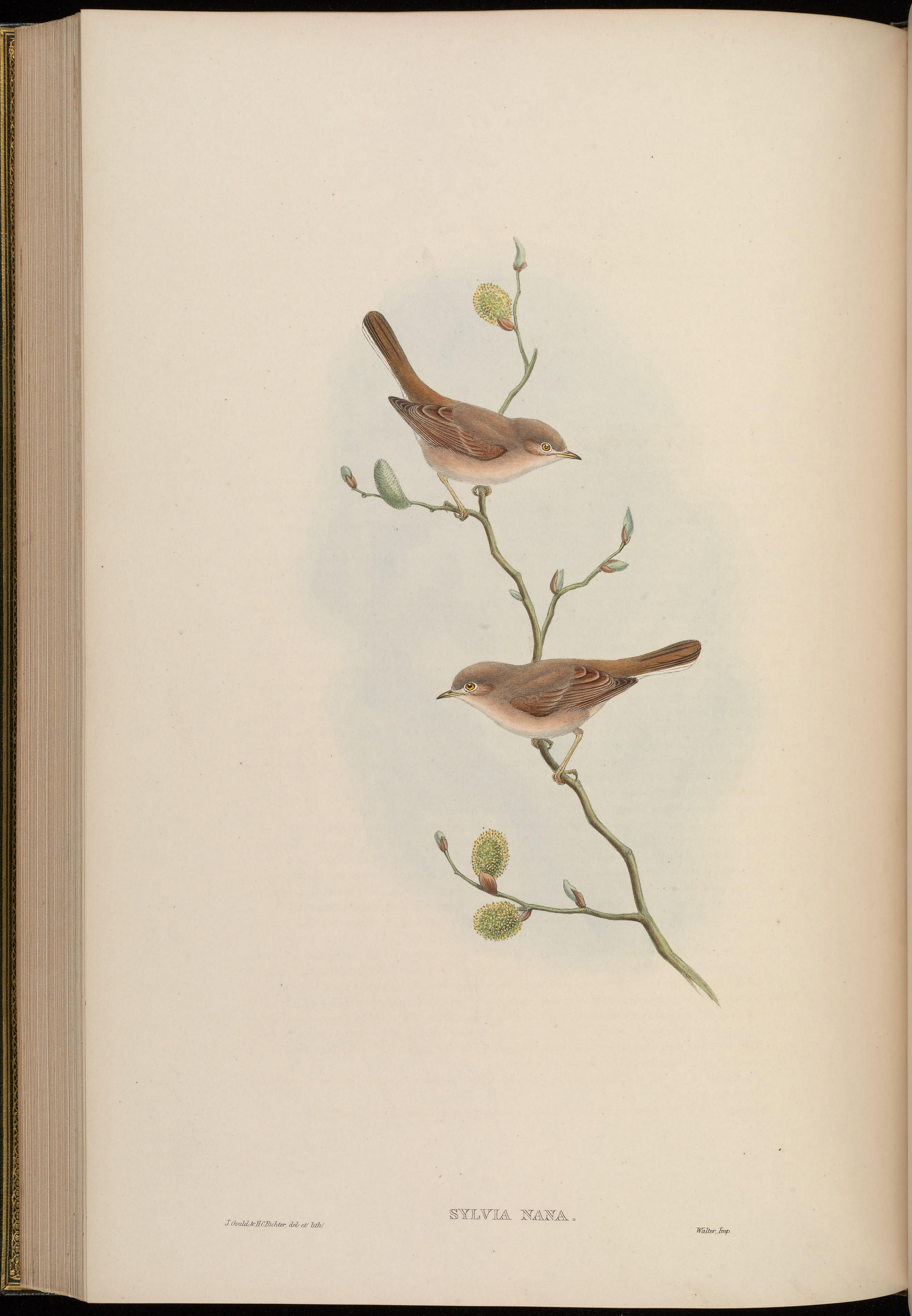 Sylvia nana